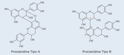 A eta B motatako proantozianidinak